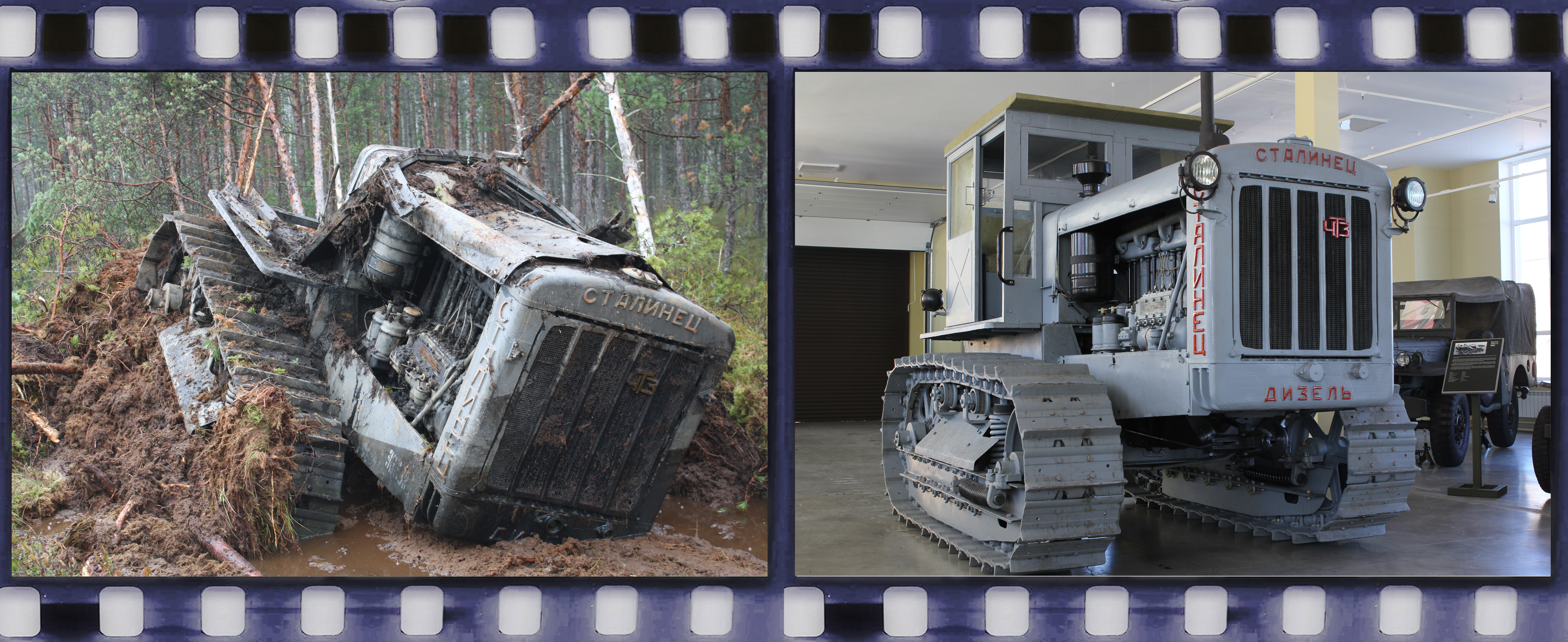 Трактор Сталинец С65 до реставрации и после.